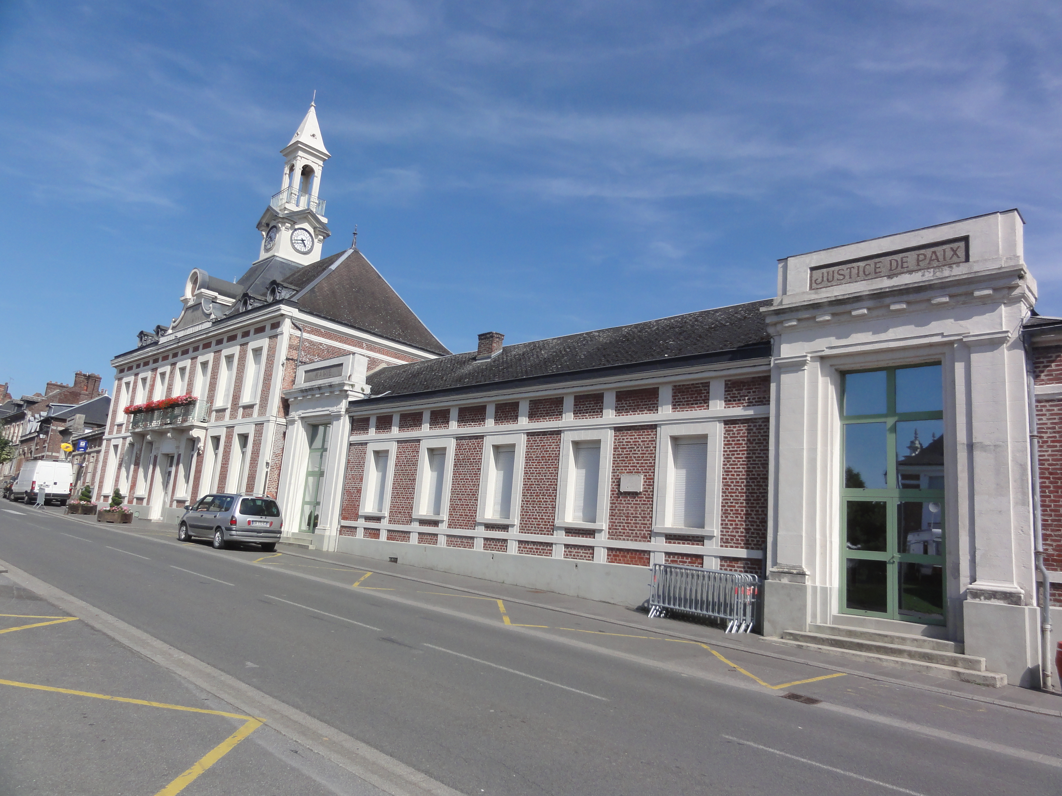 Ribemont (Aisne) hotel de ville et justice de paix